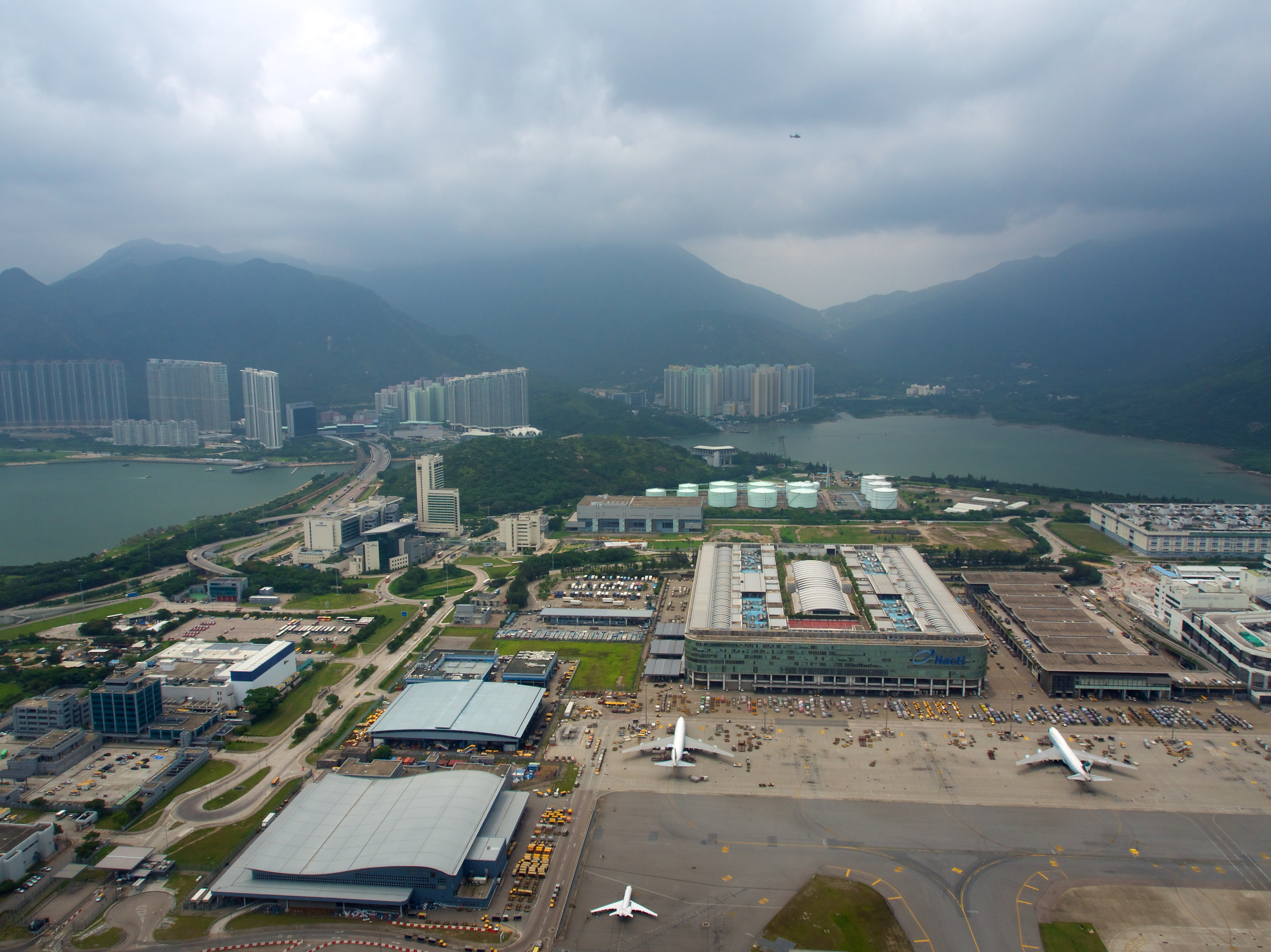 HKIA